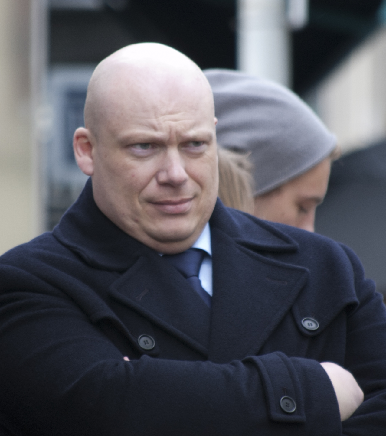 PVV-politicus Eric Lucassen tijdens de jaarlijkse Pim Fortuyn-herdenking in Rotterdam.